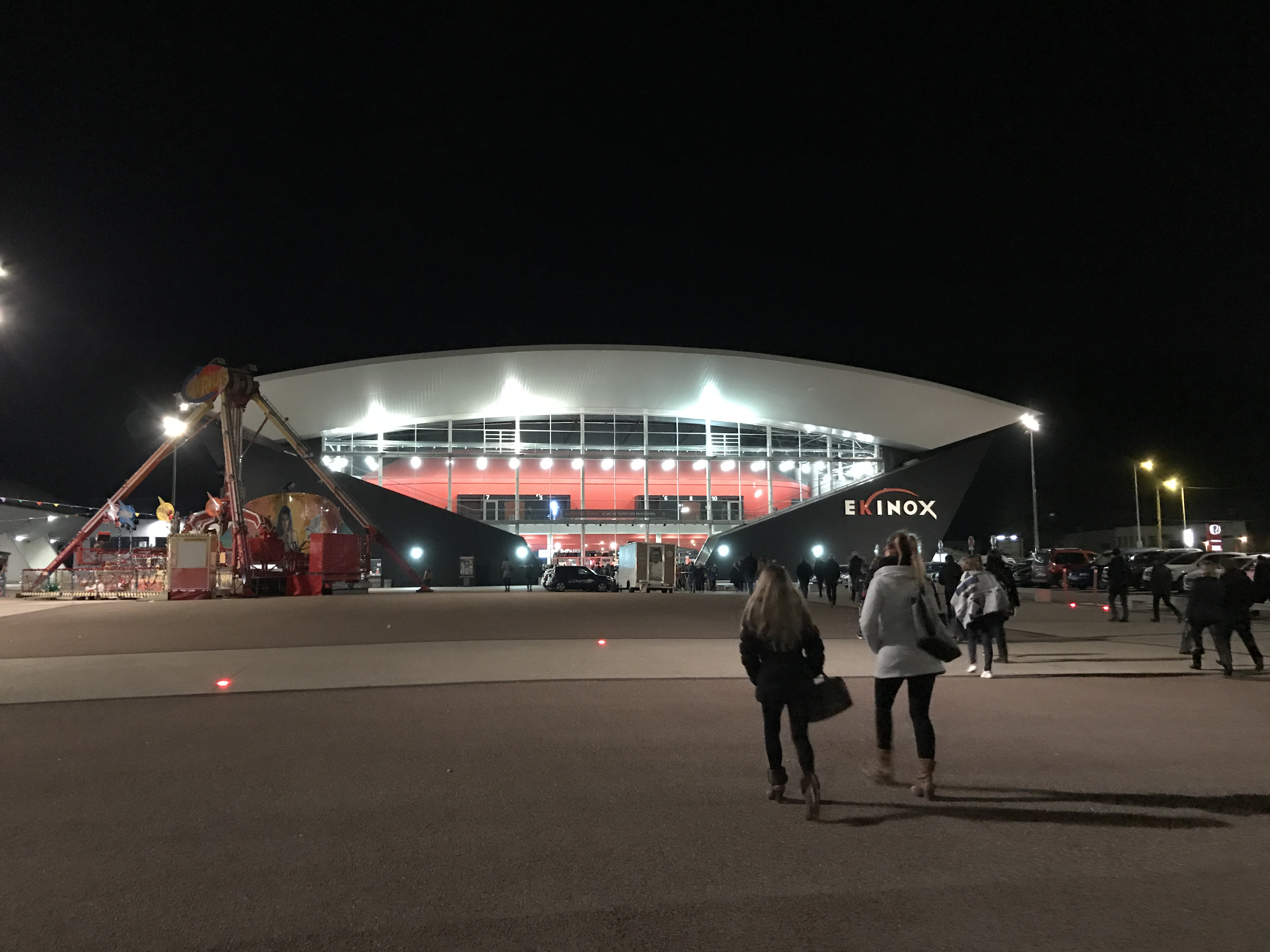 Ekinox à Bourg-en-Bresse.